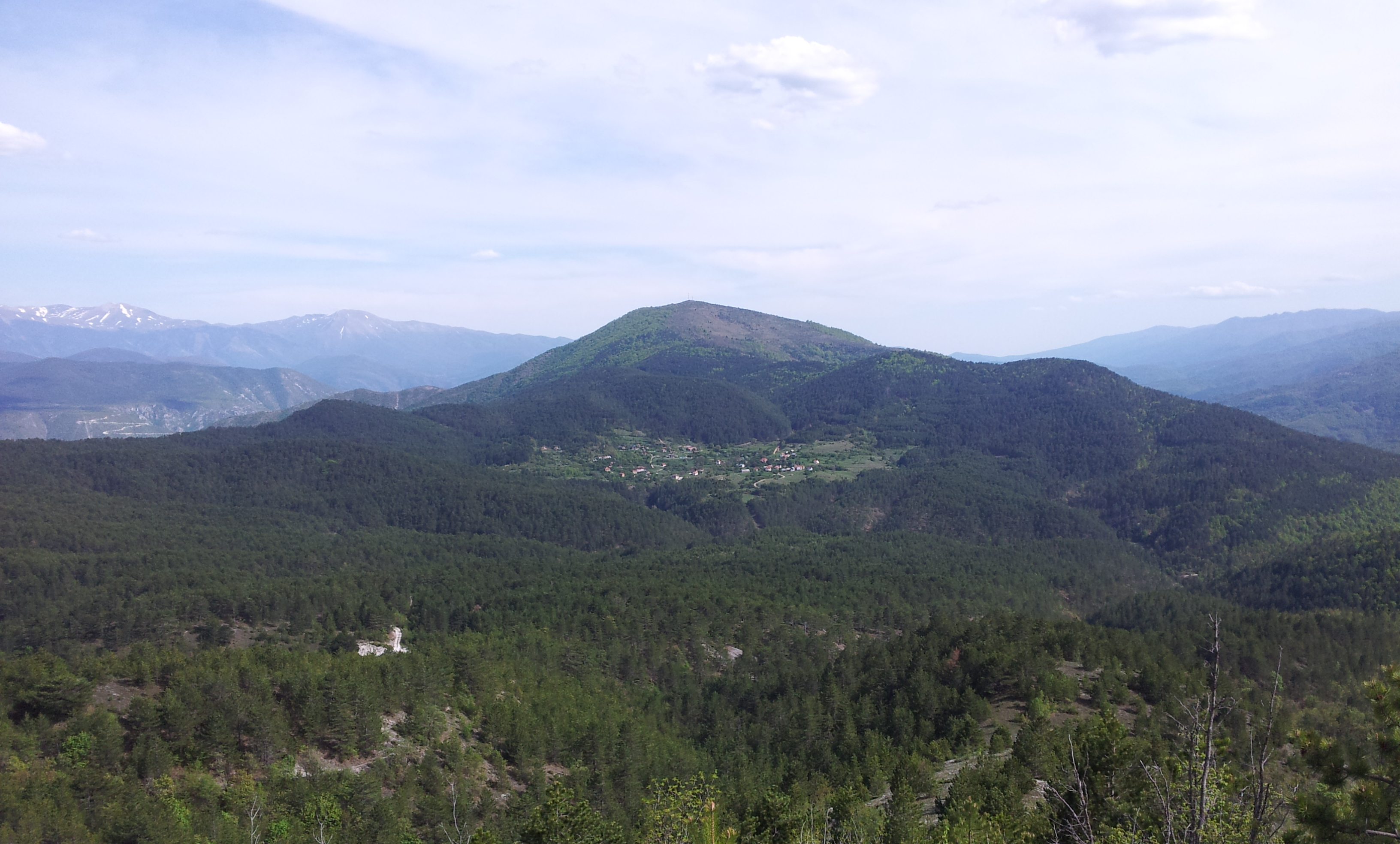 Поглед на селото Требовле од врвот Луковец. Во позадина од лева страна се гледа патот за с. Брезница.